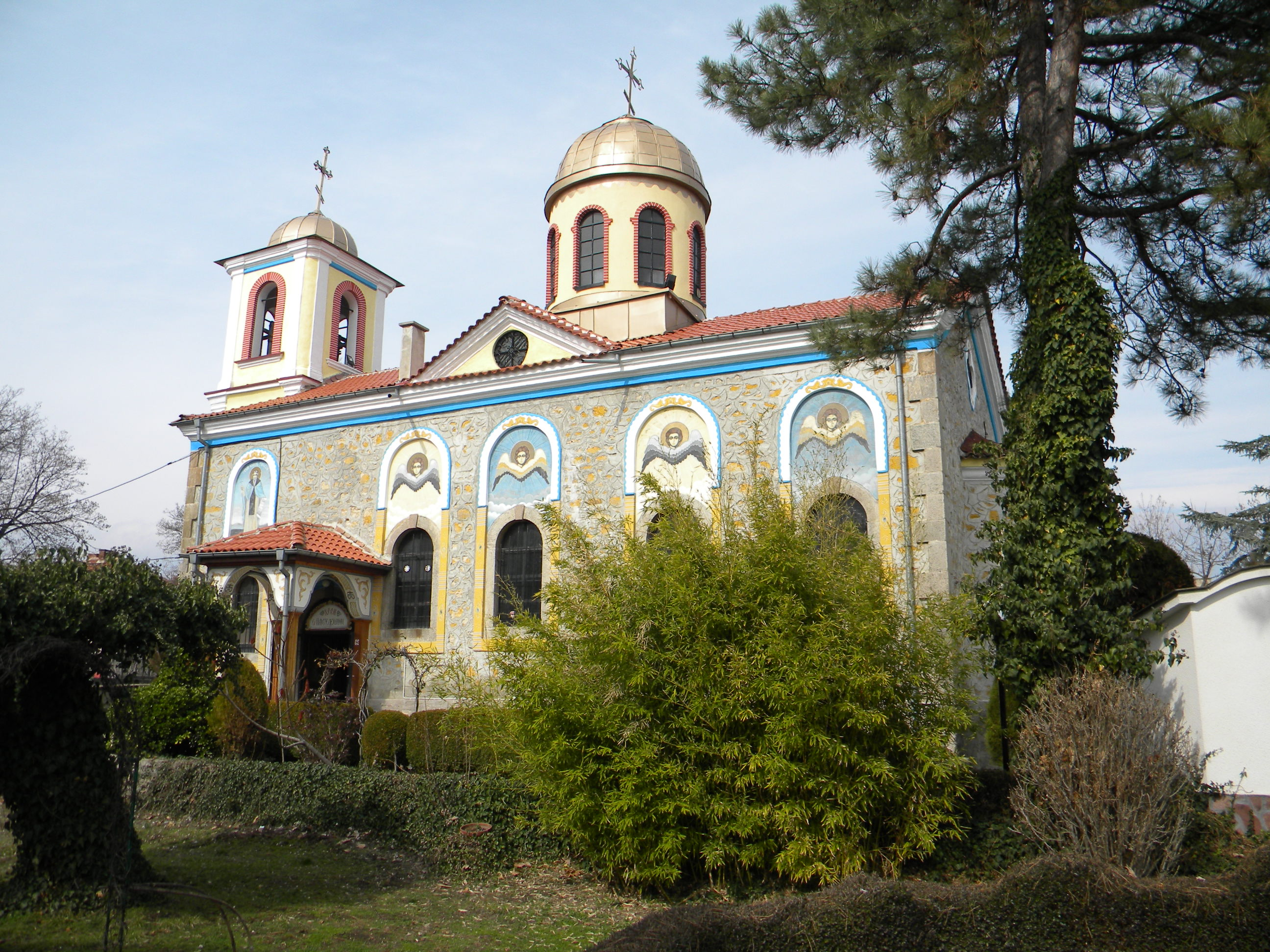 Храмът Свети Пантелеймон